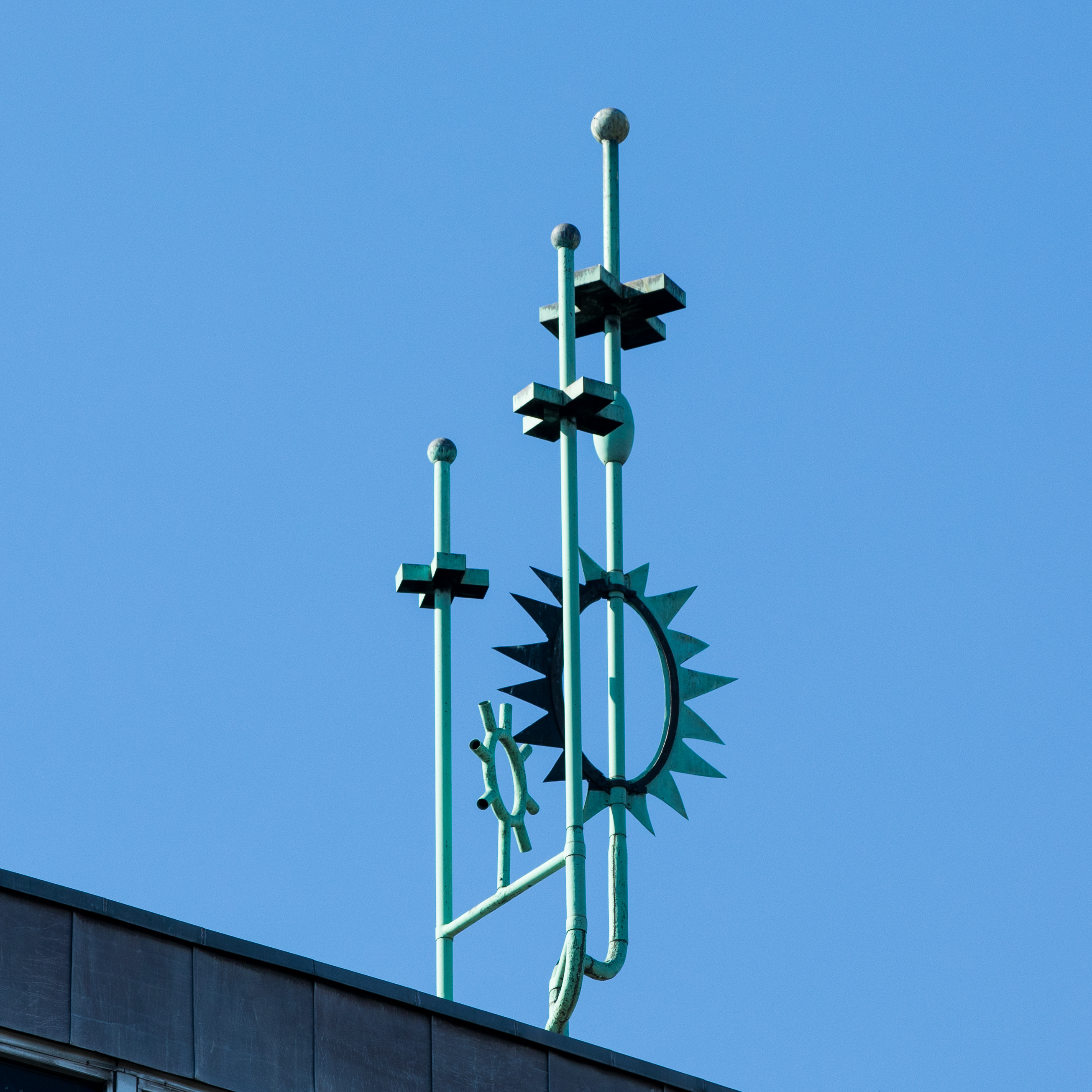 St. Franziskus, Köln-Bilderstöckchen